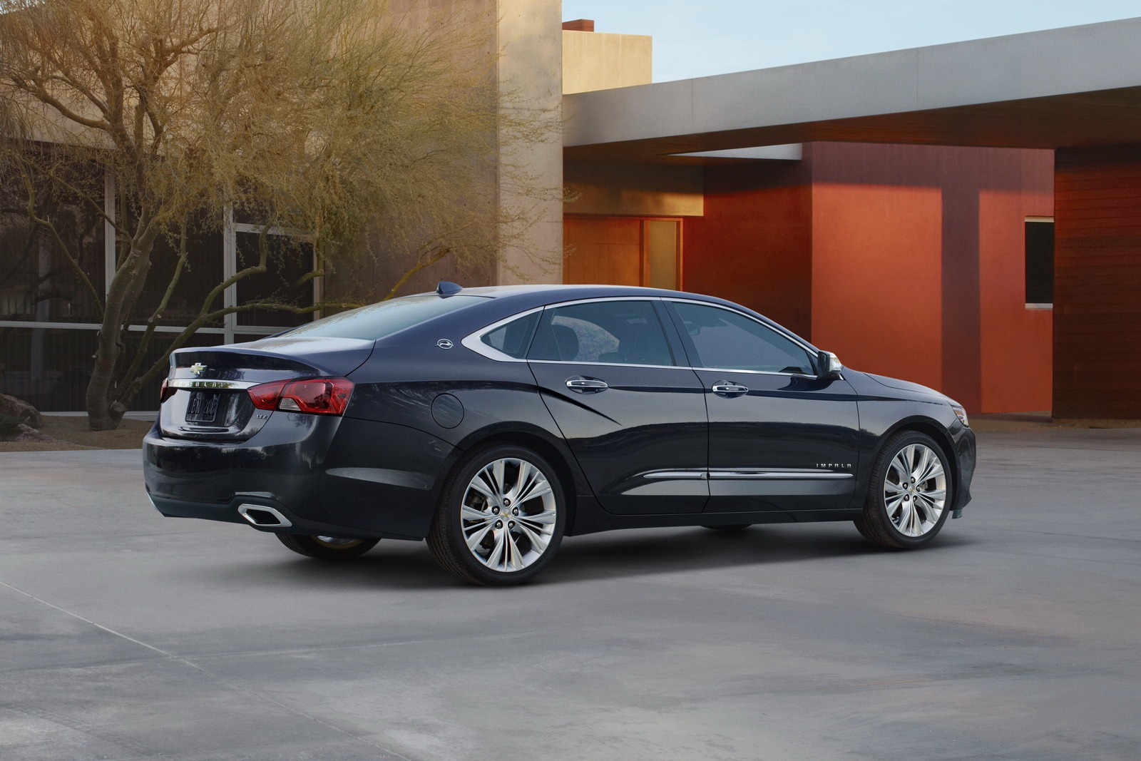 Impala 2014